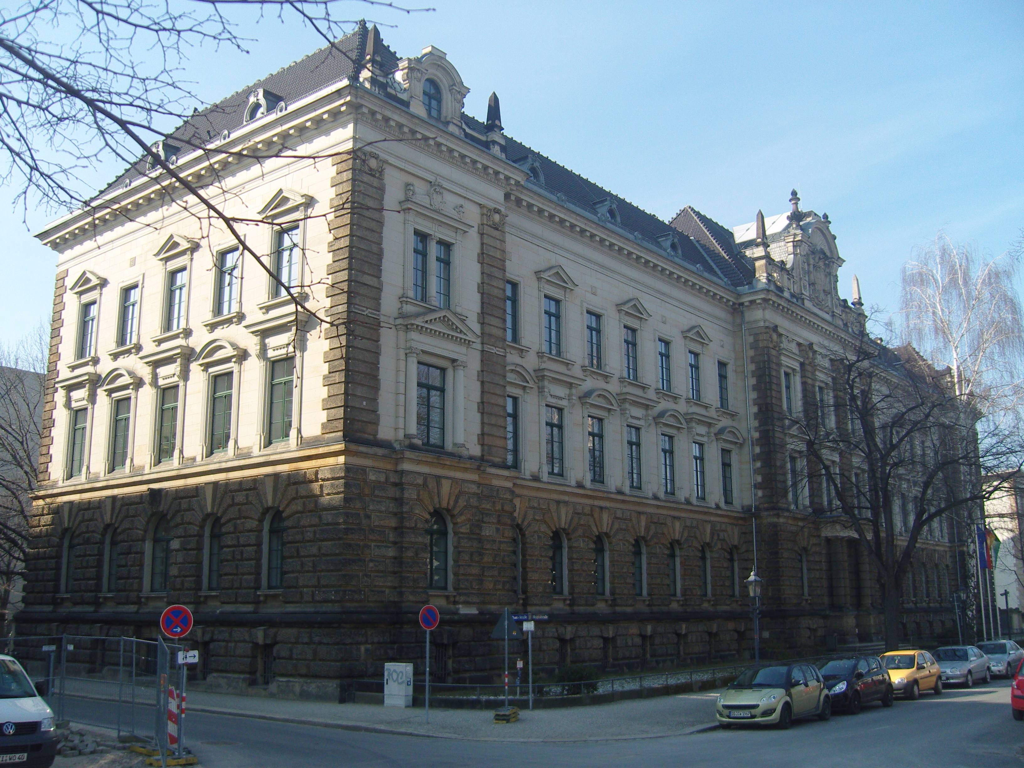 Gebäude des Sächsisches Staatsministerium der Justiz und für Europa, denkmalgeschützt